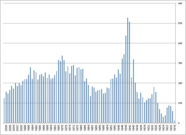 תאונות אוויריות לפי שנה